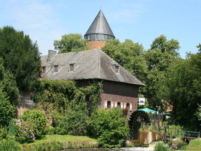 Brüggener Mühle auch Burgmühle genannt